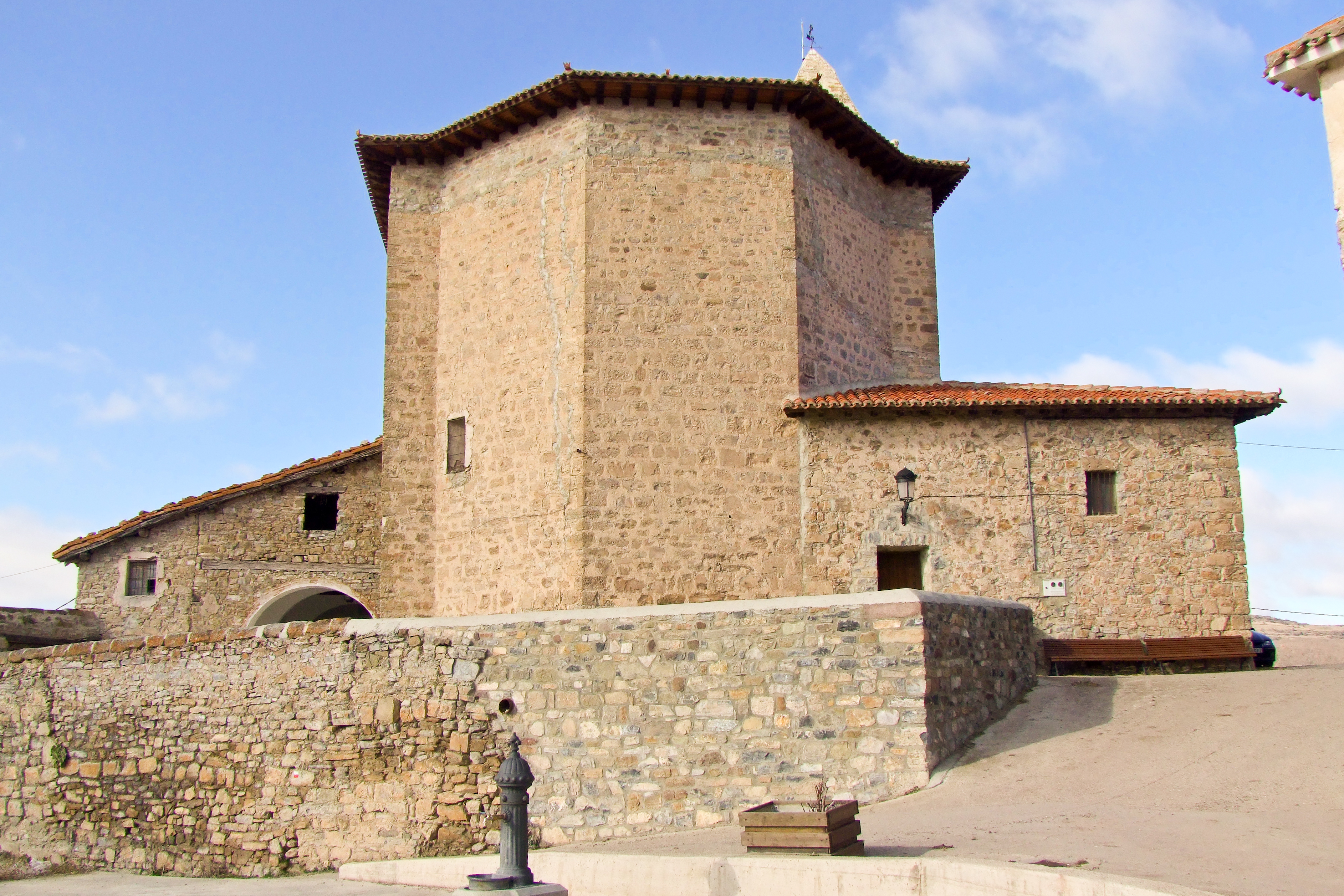 Iglesia de San Martín en la localidad de Torre en Cameros, La Rioja - España